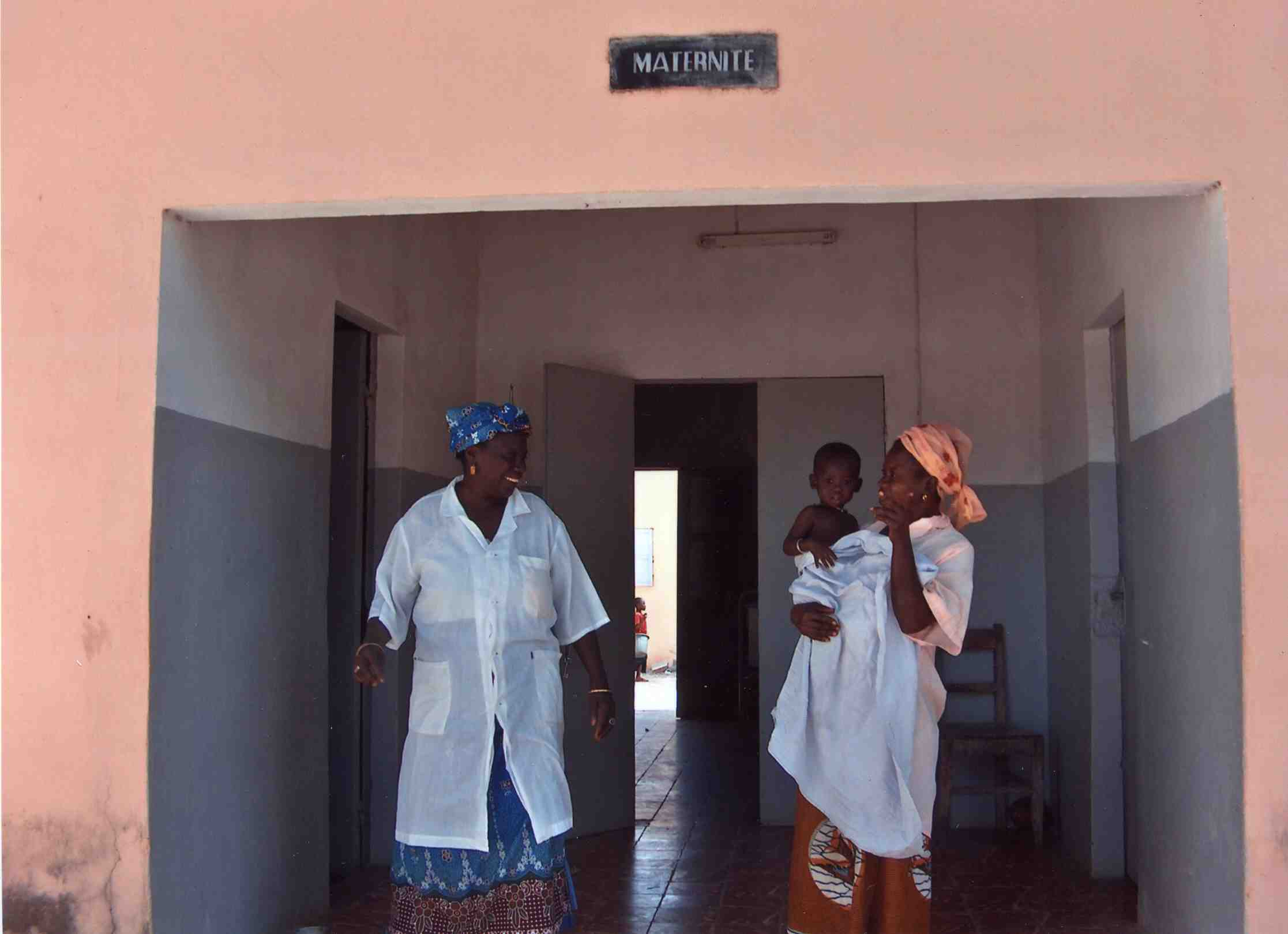 Maternité de l'île de Niodior (Sine Saloum, Senegal)